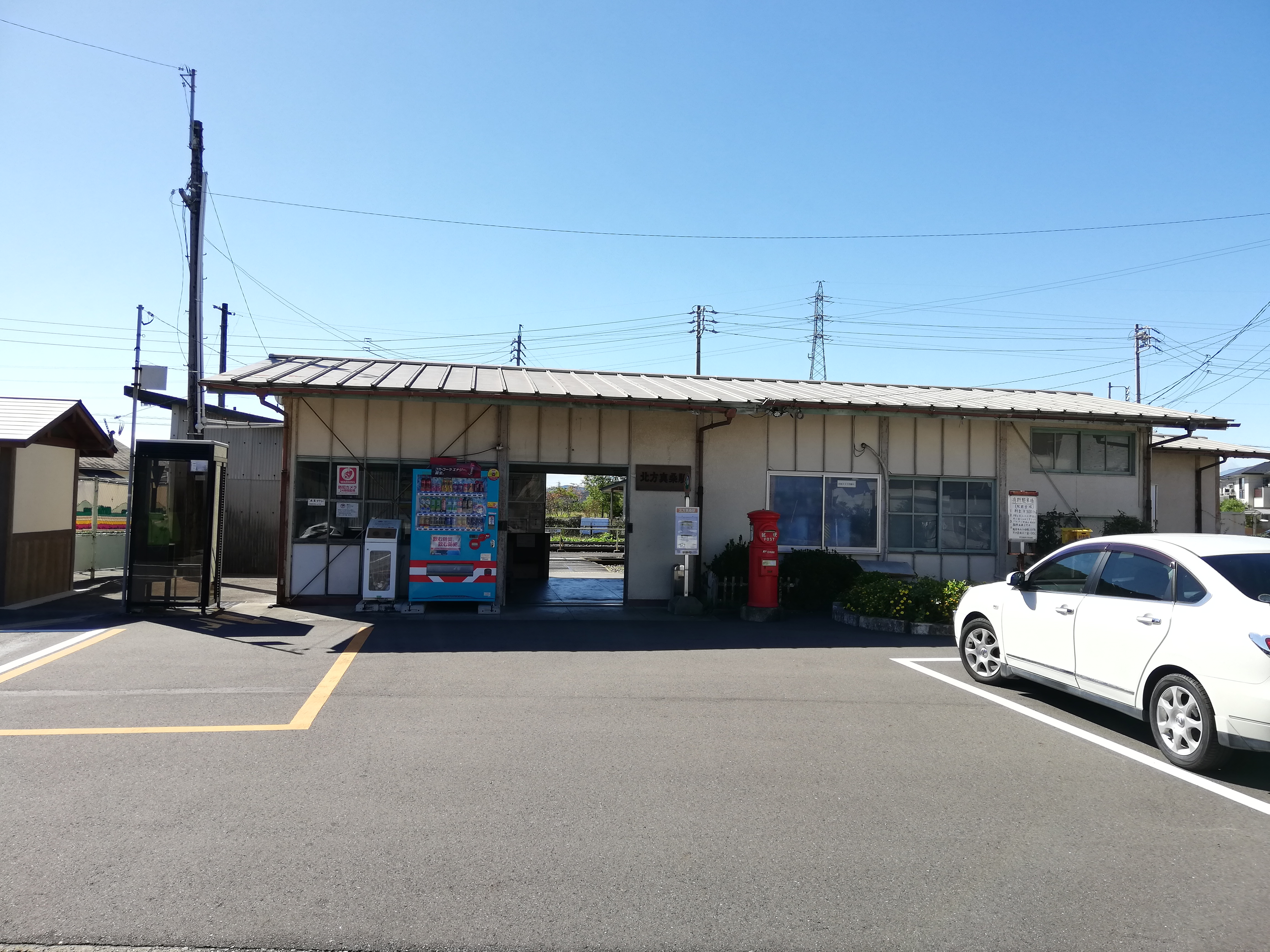 樽見線の北方真桑駅。